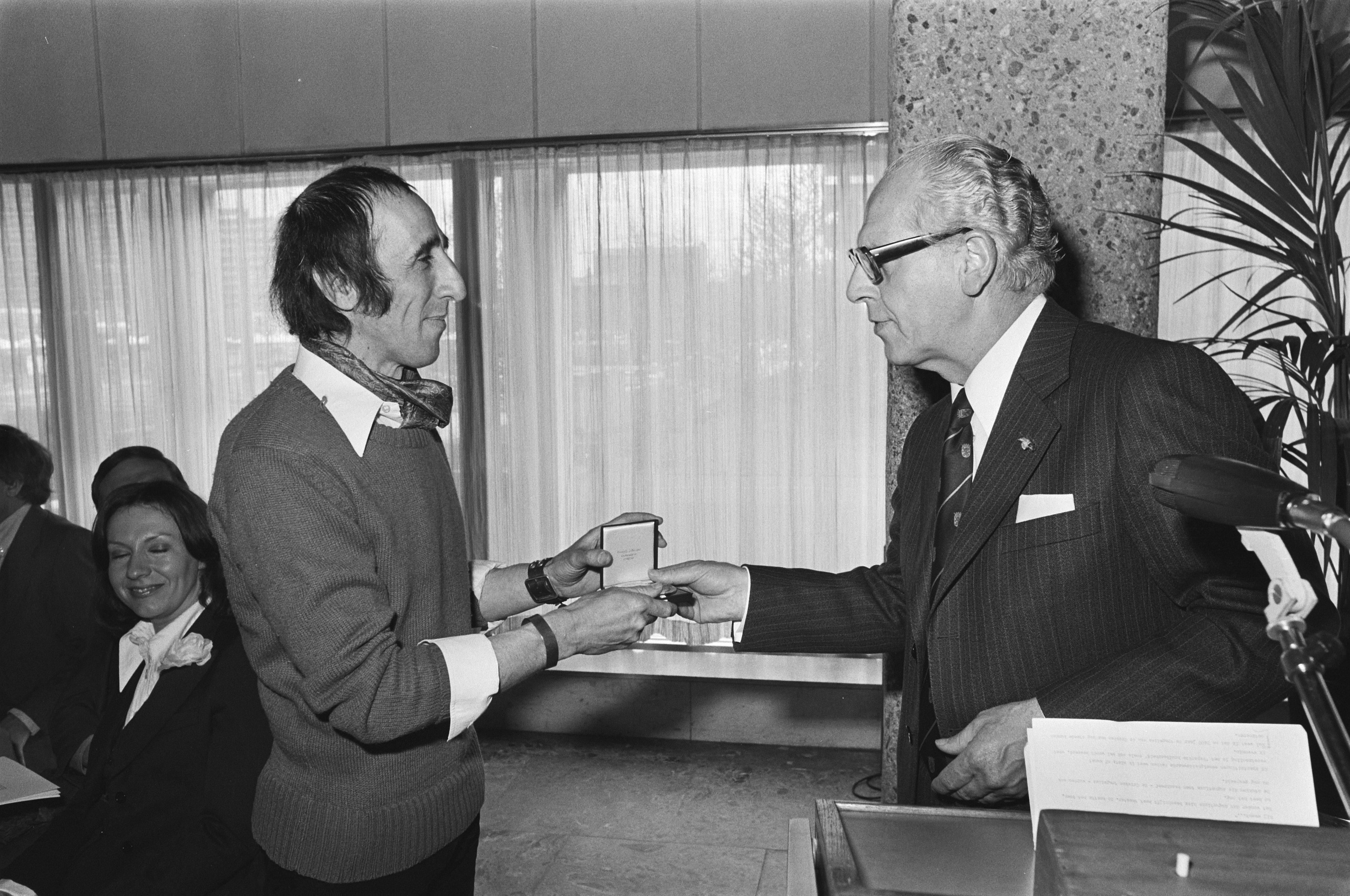 Collectie / Archief : Fotocollectie Anefo Reportage / Serie : [ onbekend ] Beschrijving : 14/15, Commisaris van de Koningin in Zuid Holland , M. Vrolijk reikt Louis d'Or uit aan Peter van der Linden Datum : 13 mei 1976 Locatie : Zuid-Holland Persoonsnaam : Vrolijk, M. Fotograaf : Mieremet, Rob / Anefo Auteursrechthebbende : Nationaal Archief Materiaalsoort : Negatief (zwart/wit) Nummer archiefinventaris : bekijk toegang 2.24.01.05 Bestanddeelnummer : 928-5756